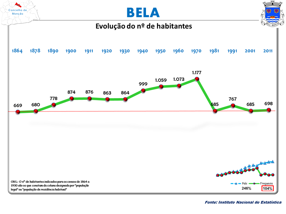 Censos 1864/2011